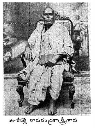 ప్రాచీన గ్రంధ రచయిత